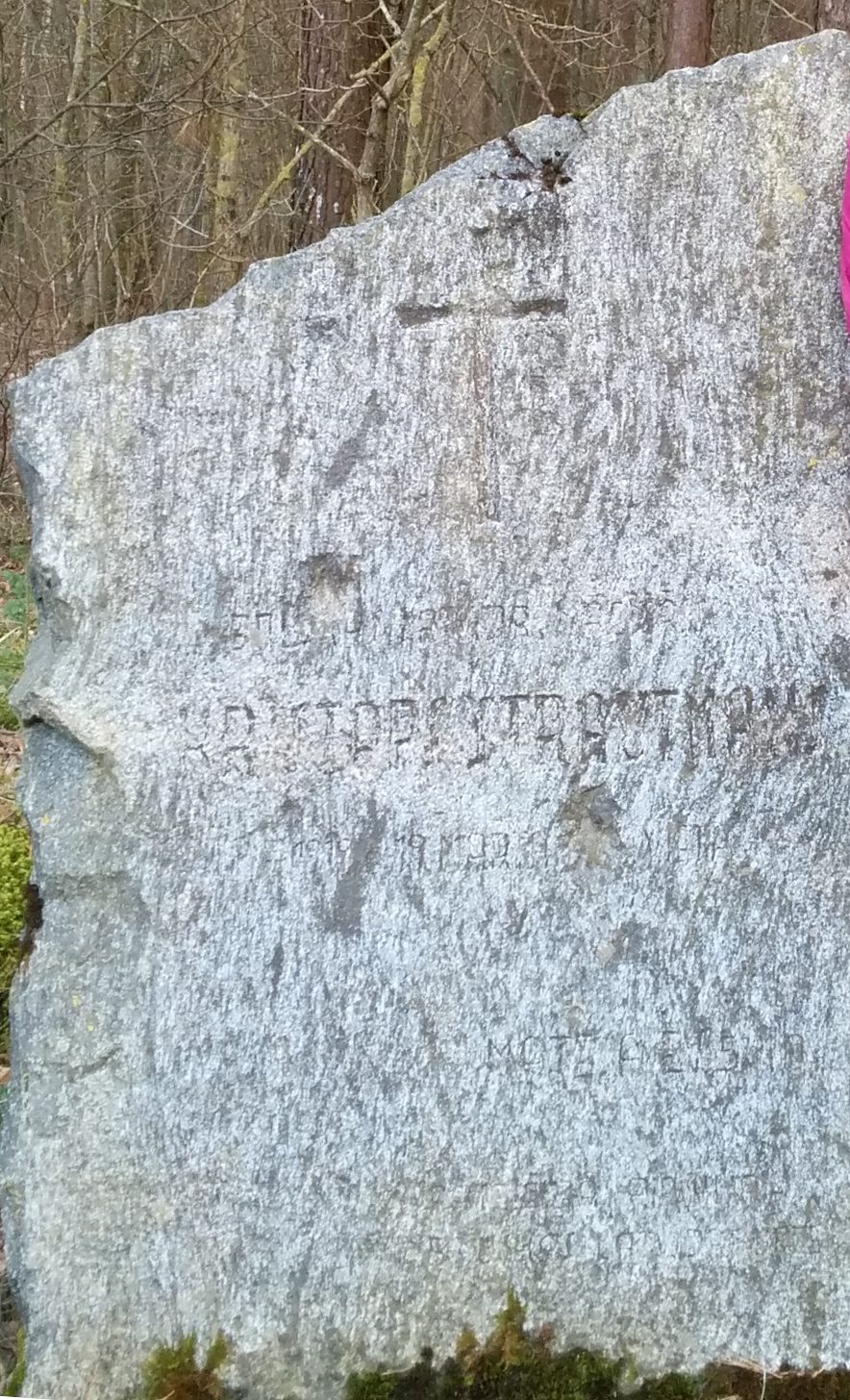 Gedenkstein für den 1919 erschossenen Pastor Strautmans in einem Wald östlich von Bauska. Unweit davon befindet sich eine Gedenkstätte für 1941 dort erschossene jüdische Einwohner Bauskas.